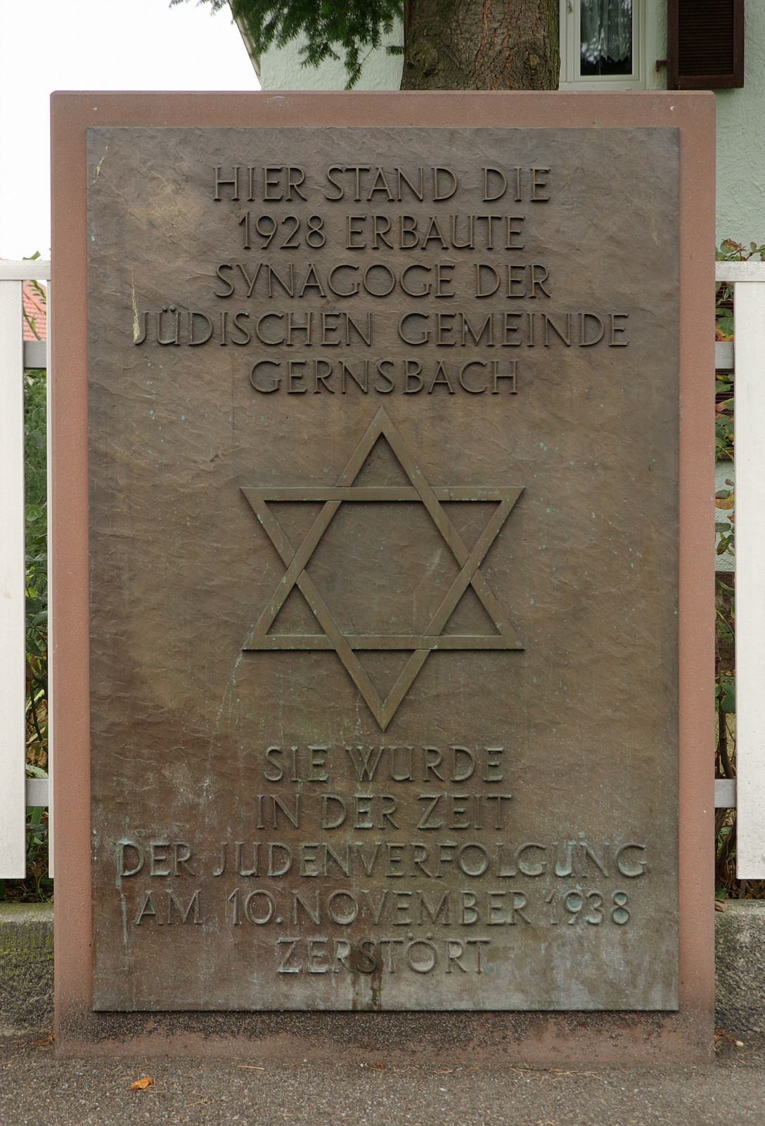 Gedenktafel für die 1928 erbaute und 1938 zerstörte Synagoge in der Gernsbacher Austraße.